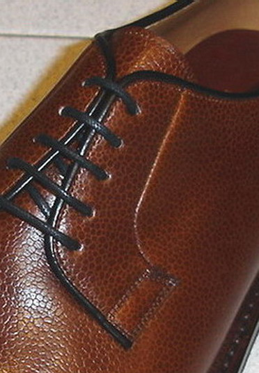 Bluecher-Schaftschnitt